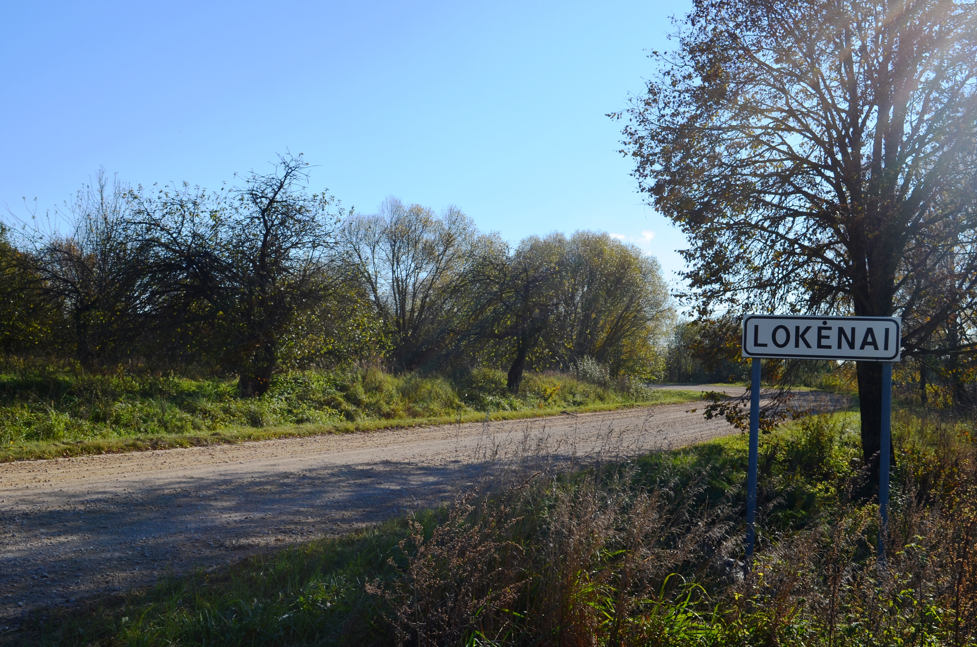 Lokėnai, Ukmergės r.